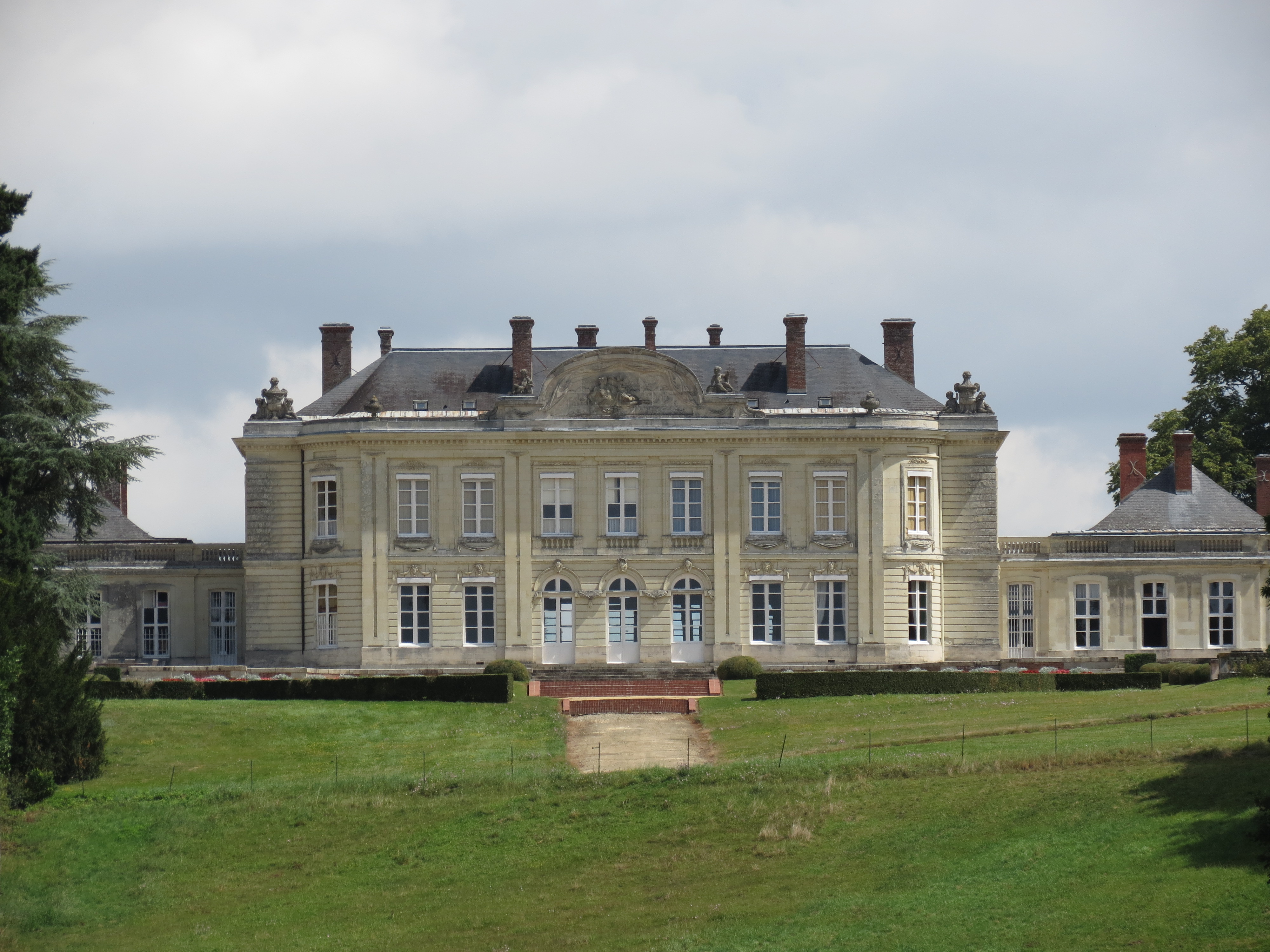 Château de Craon, en Mayenne, Pays de la Loire.